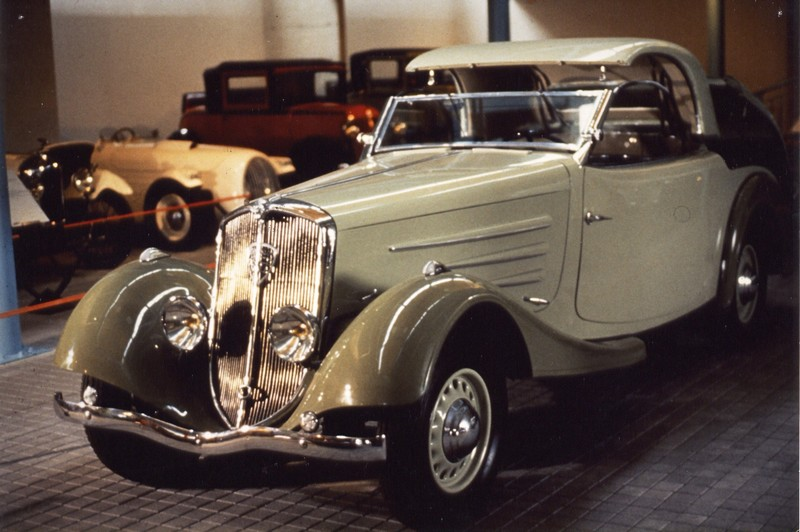 Peugeot 601d Eclipse carrossée par Pourtout